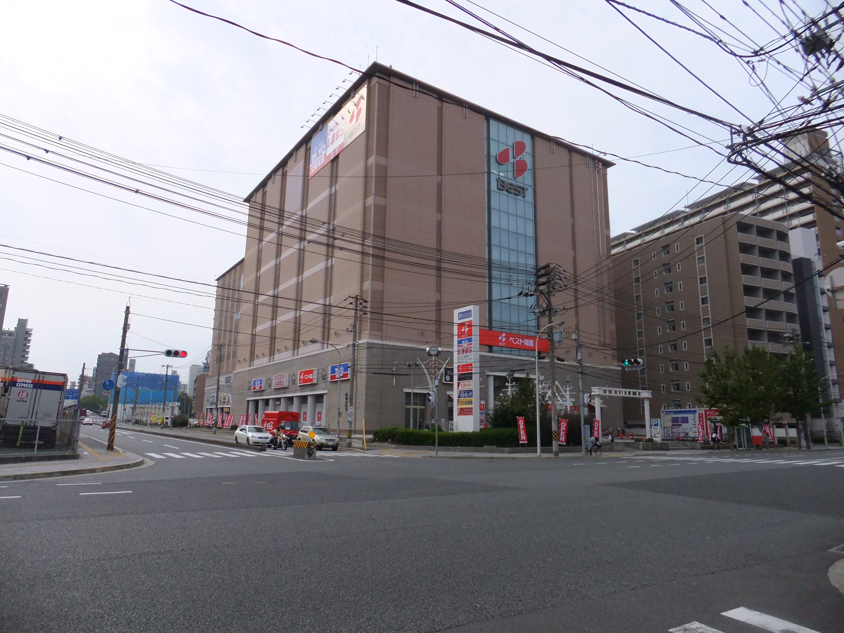 ひろしまMALL